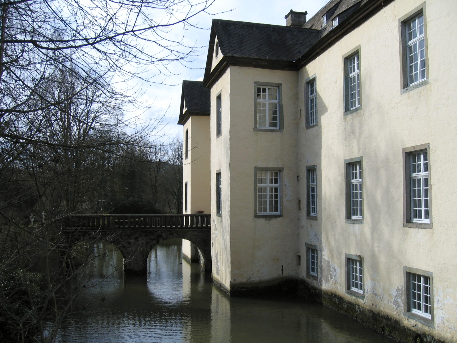 Schloss Wocklum (Privatbesitz) in Balve-Wocklum This image shows a heritage building in Germany, located in the North Rhine-Westphalian city Balve (no. 6).